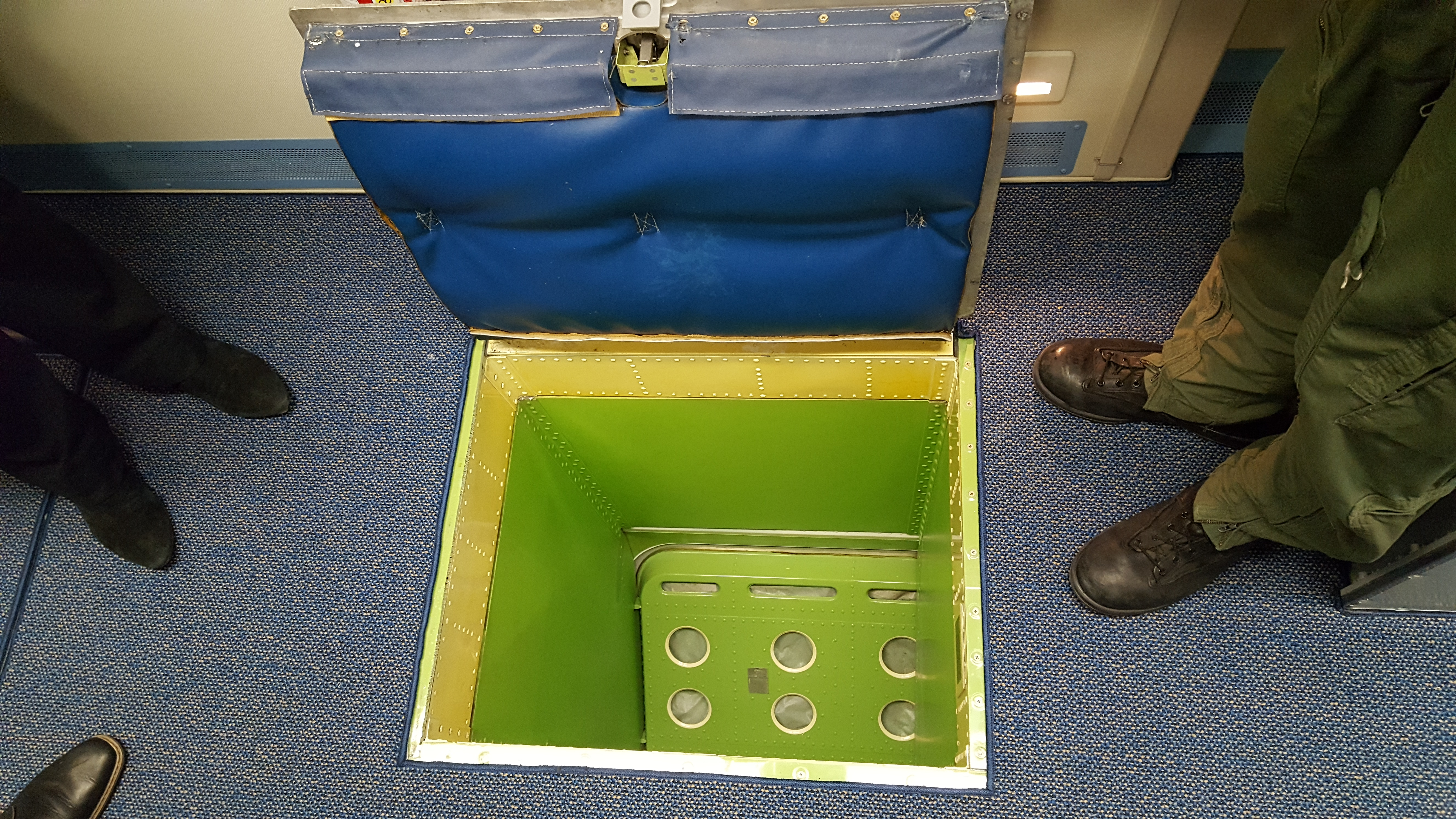 AWACS Boeing E-3 in Geilenkirchen. Notausstiegslucke für den Absprung aus der Luft.